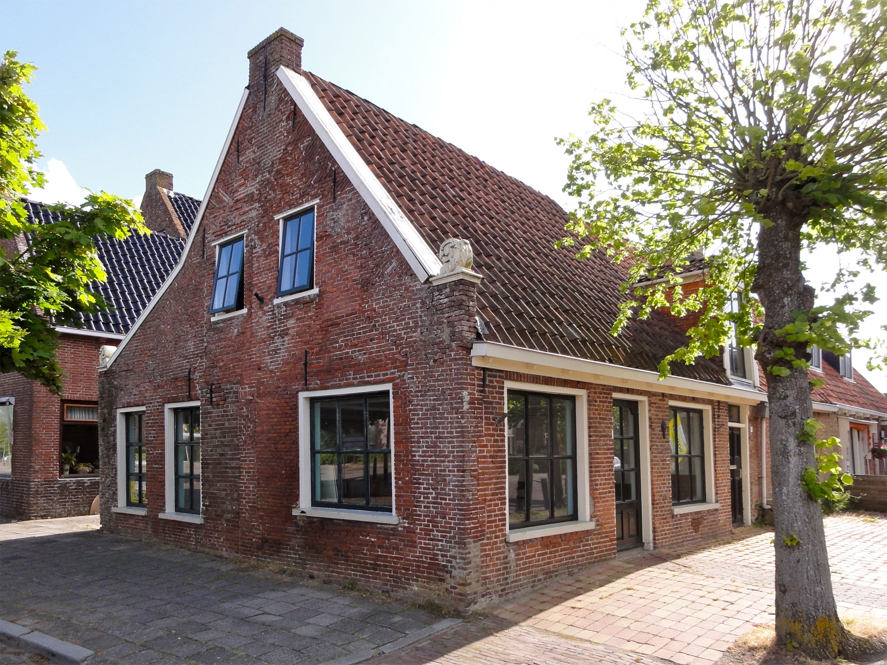 Farrewei 1-3 in Blija